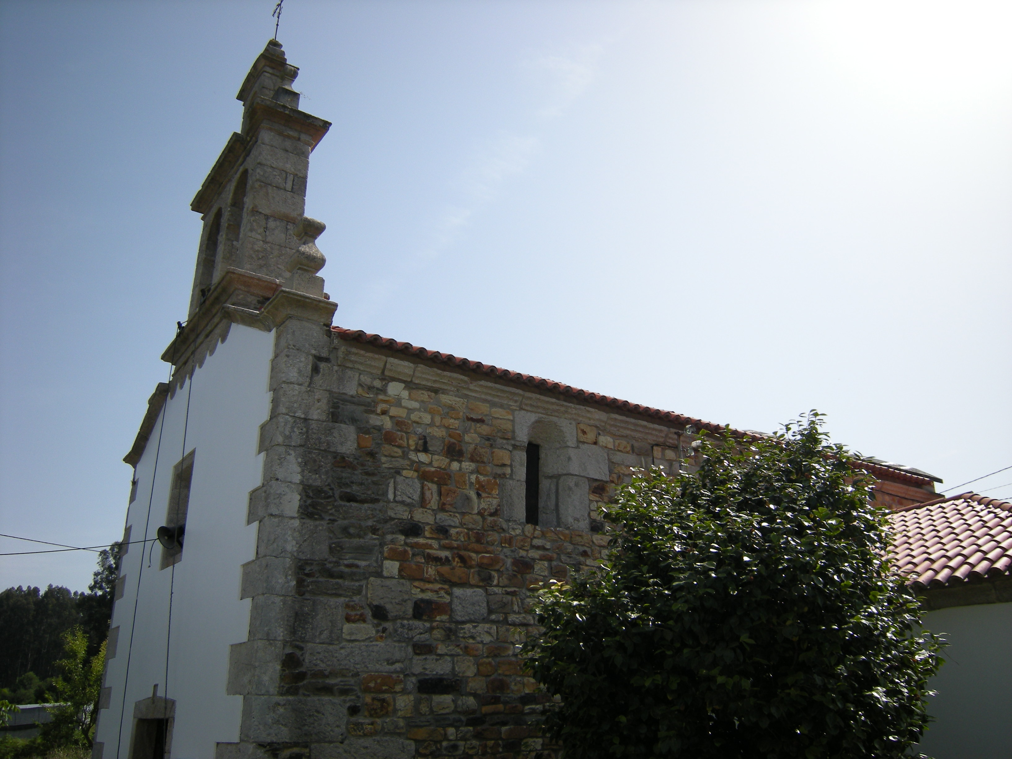 Iglesia de San Xoán de Vilanova